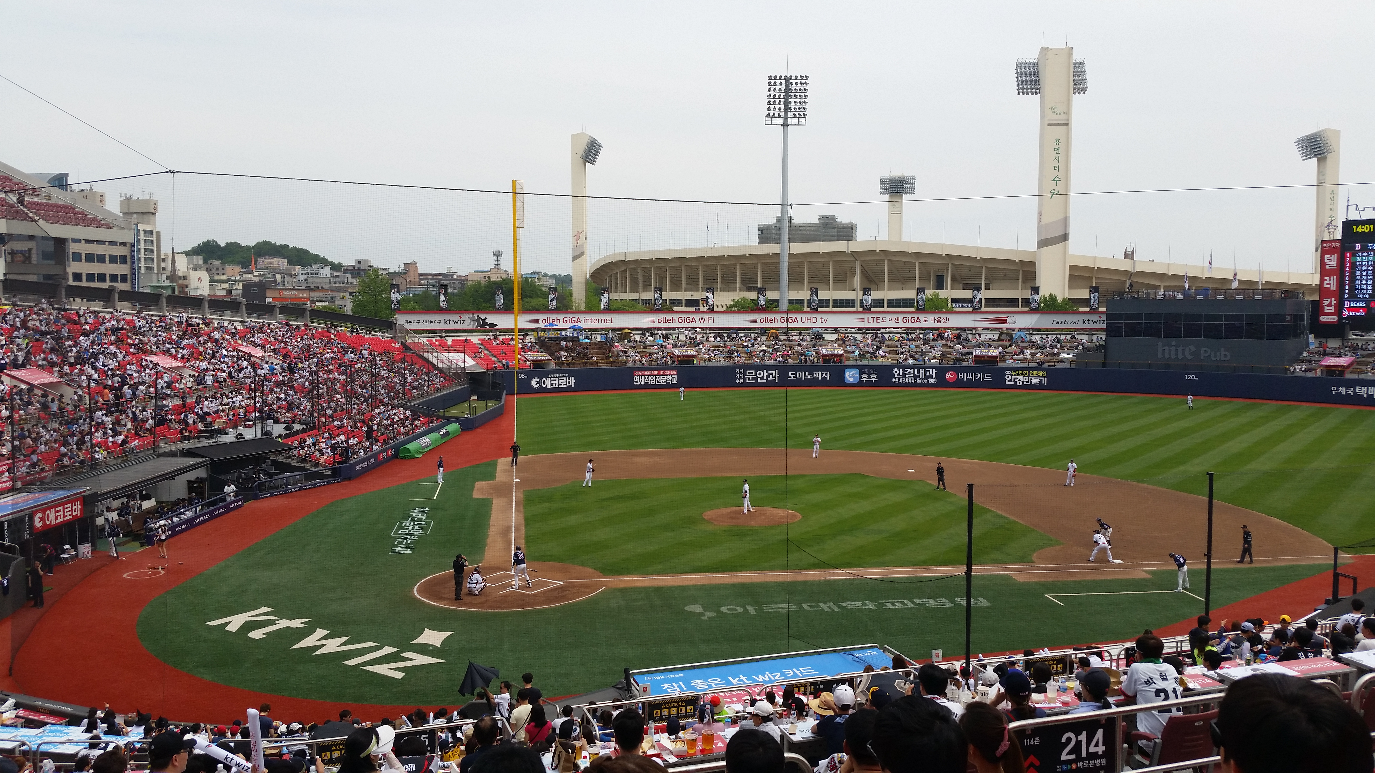 수원 KT 위즈 파크